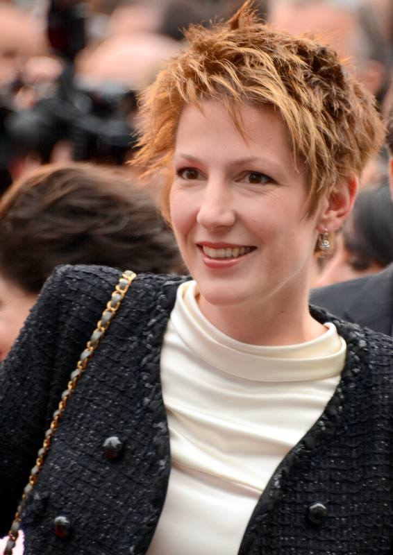 Natacha Polony au festival de Cannes